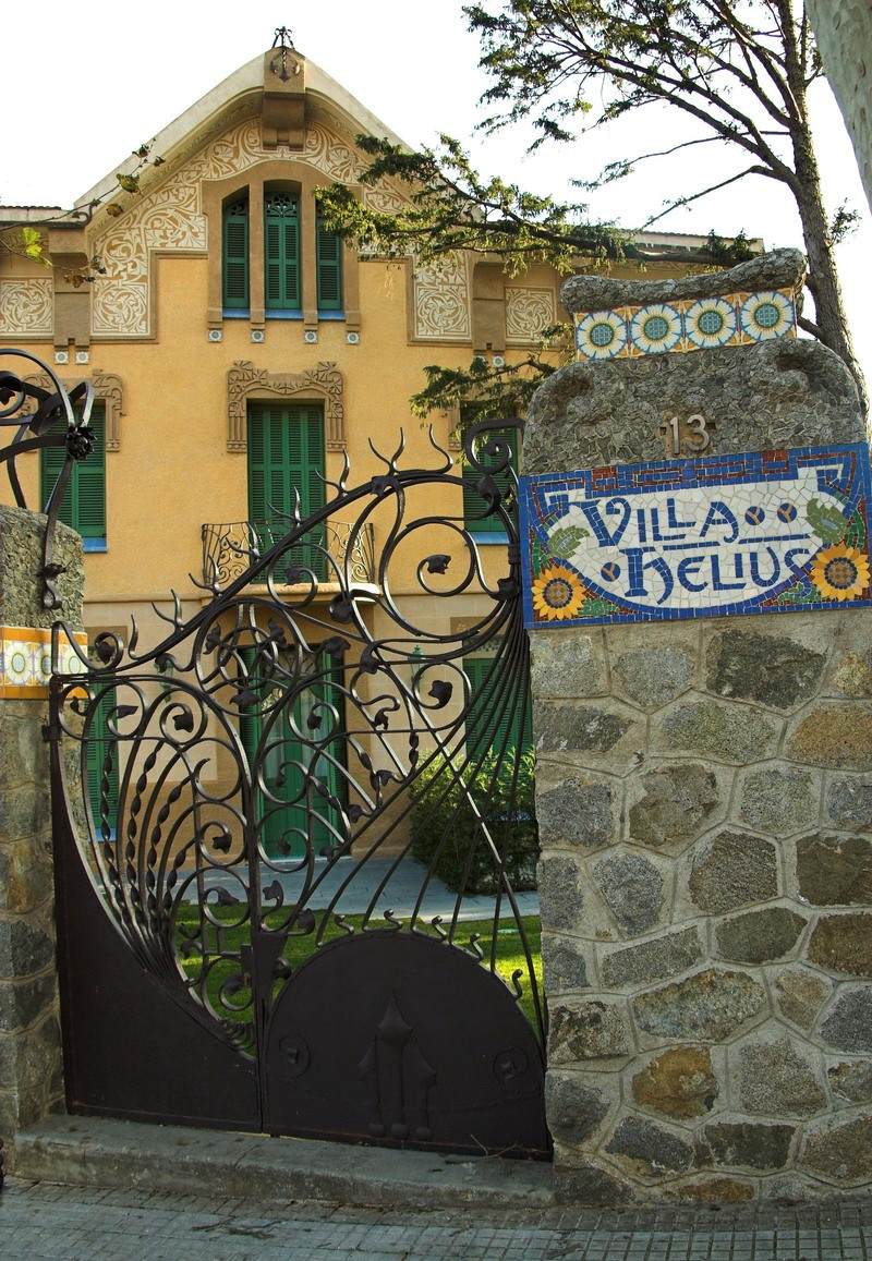 Villa Helius (Barcelona-Catalunya), obra de Joaquim Raspall 1909. C/Panamà, 13. Porta tanca exterior.